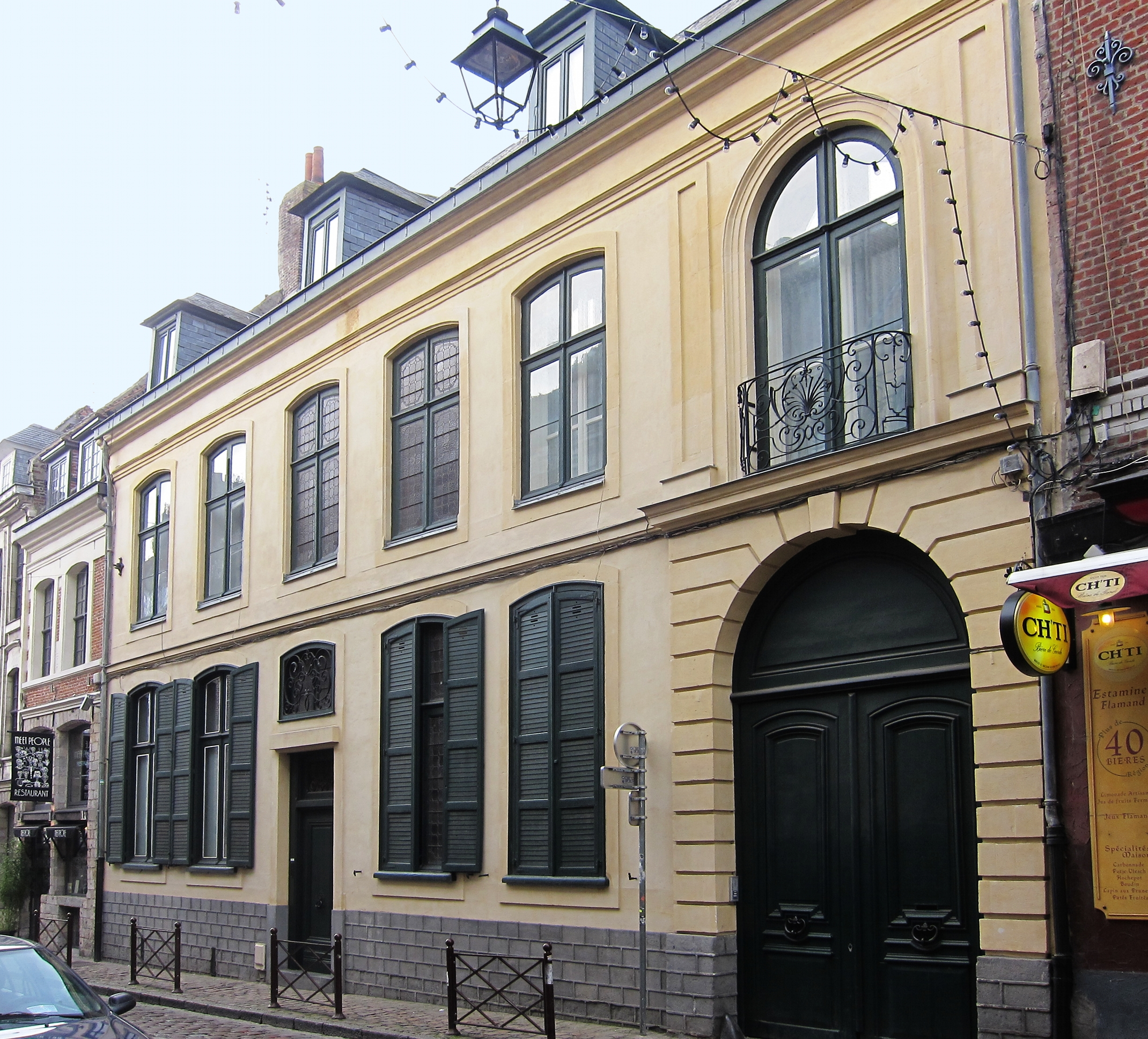 Hôtel de Madre 23 rue de Gand à Lille.